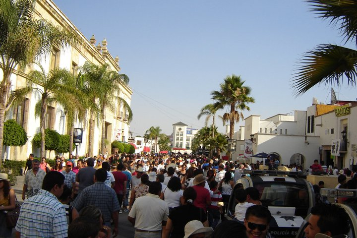 San Marcos 3